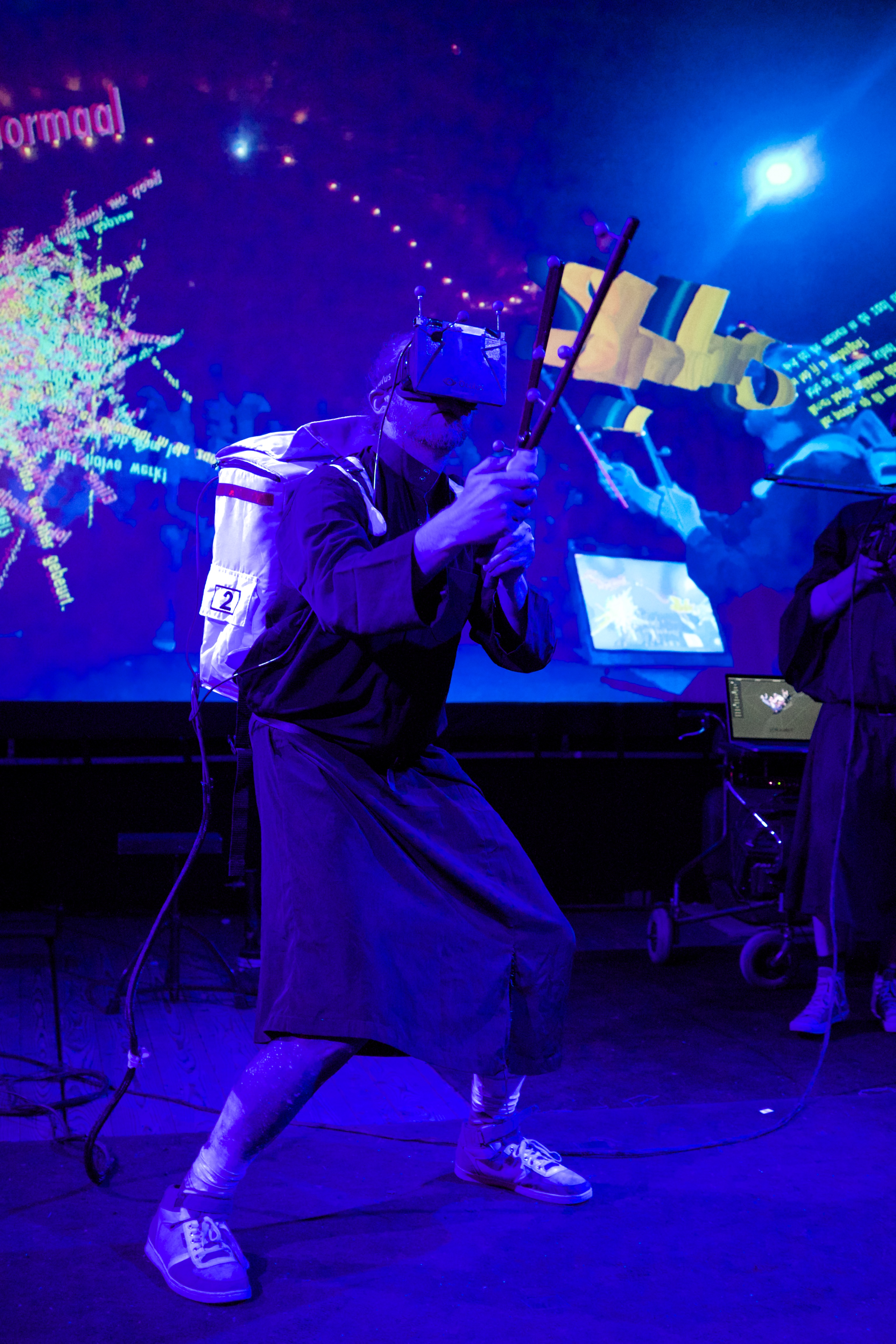 PIPS:LAB speelt Shadows in the Cloud tijdens De Parade in Utrecht.